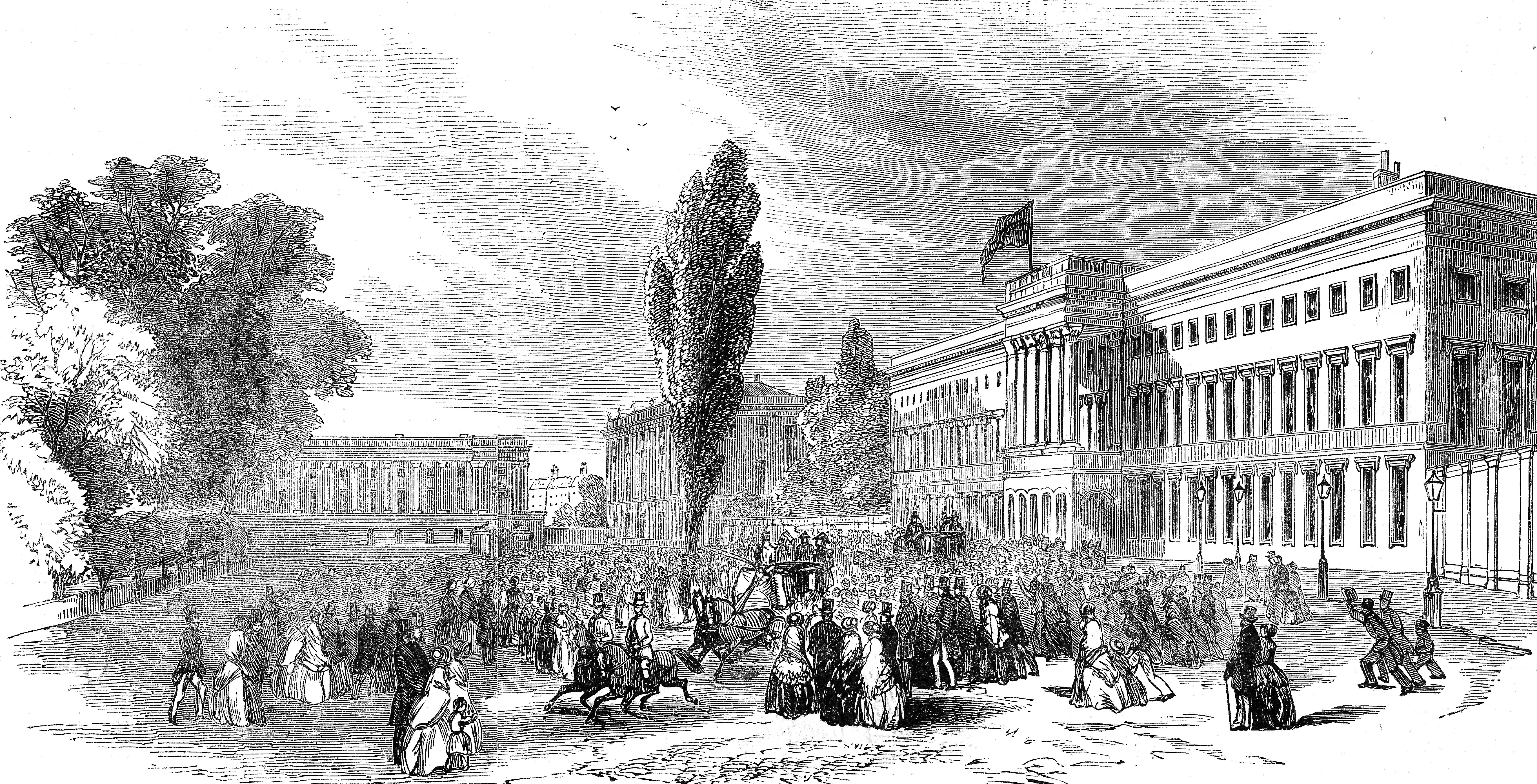 Départ pour Laeken lors de la visite en Belgique de la reine Victoria du Royaume-Uni, Palais royal (Bruxelles), août 1852. — La légende de l’Univers illustré est : « Départ du roi Léopold de Belgique de son château de Laeken, le 21 juillet. » Celle-ci comporte deux erreurs : il ne s’agit pas du Château royal de Laeken, mais du Palais royal de Bruxelles, et la date n’est pas le 21 juillet 1863, mais un certain jour d’août 1852...